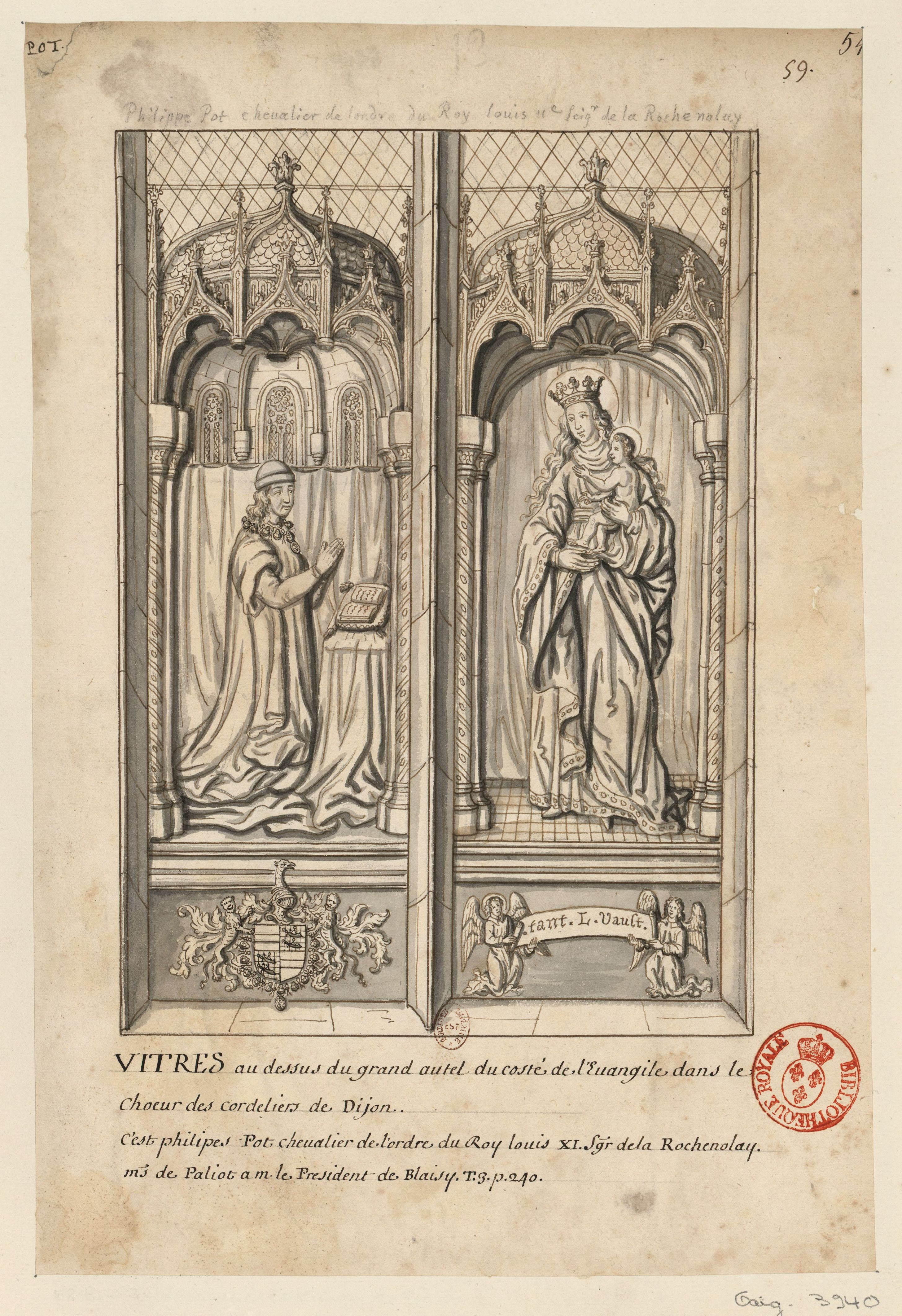 reproduction faite pour Gaignières. description : Armes : écartelé aux 1er et 4e une fasce ; aux 2e et 3e un échiqueté à deux baudelaires sur le tout. - La devise est : "Tant L. vault". - Tiré des Cordeliers de Dijon . Il s'agit de Philippe Pot, sieur de Gevrey, maréchal de Bourgogne, mort en 1494.